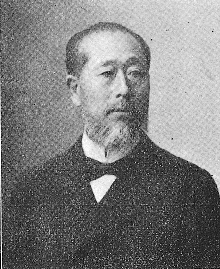 Portrait of Yasuda Zenjiro (安田善次郎, 1838 – 1921)